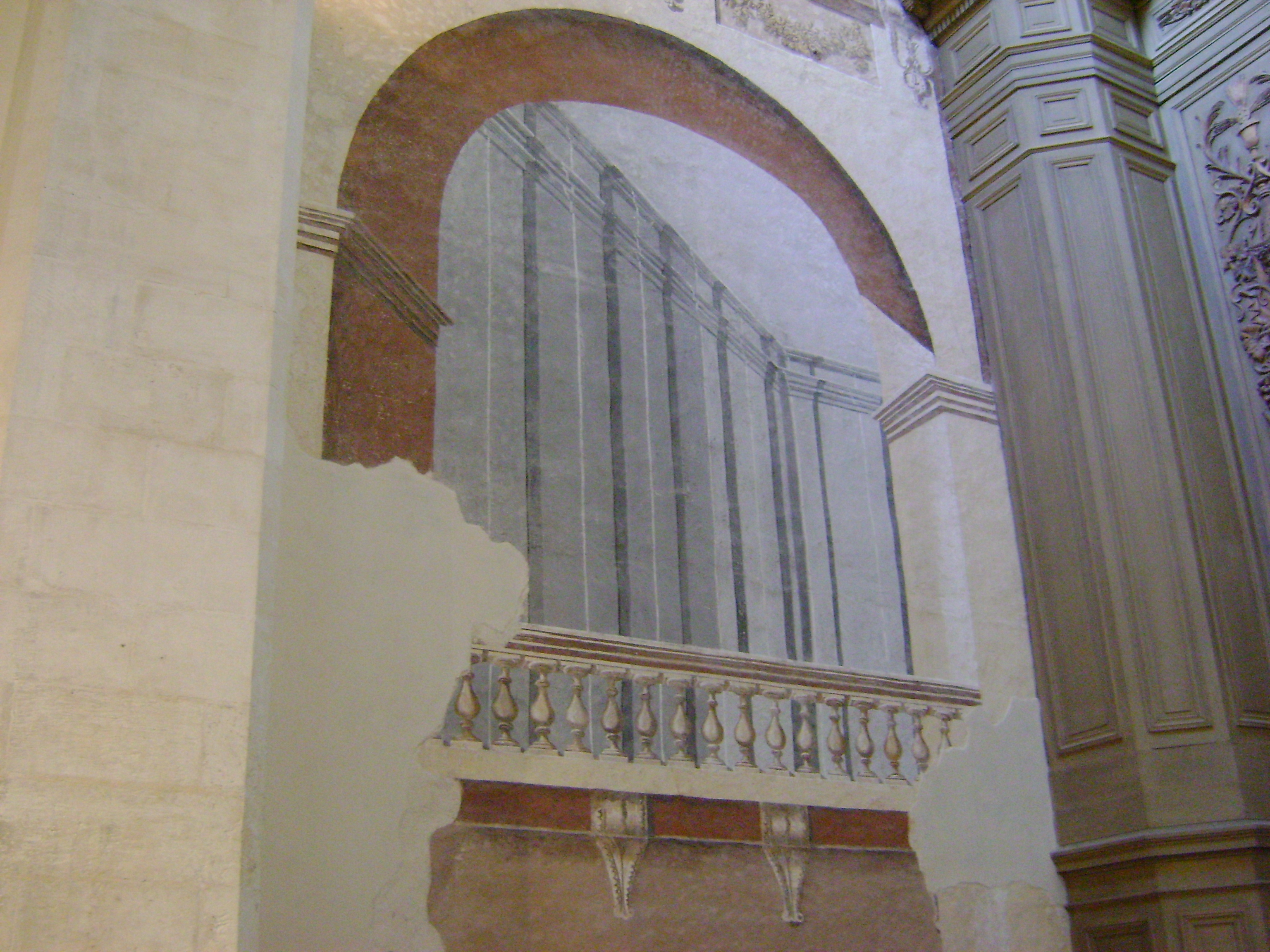 Eglise Saint-Sauveur de la Rochelle.